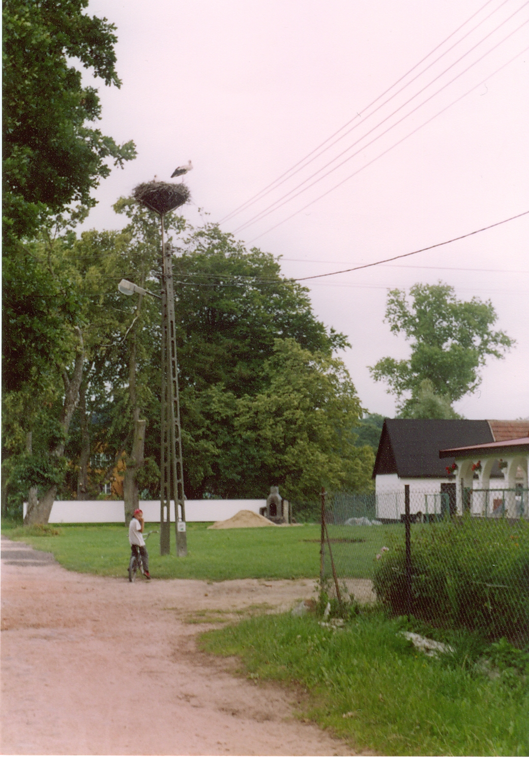 Osieki Słupskie, centrum